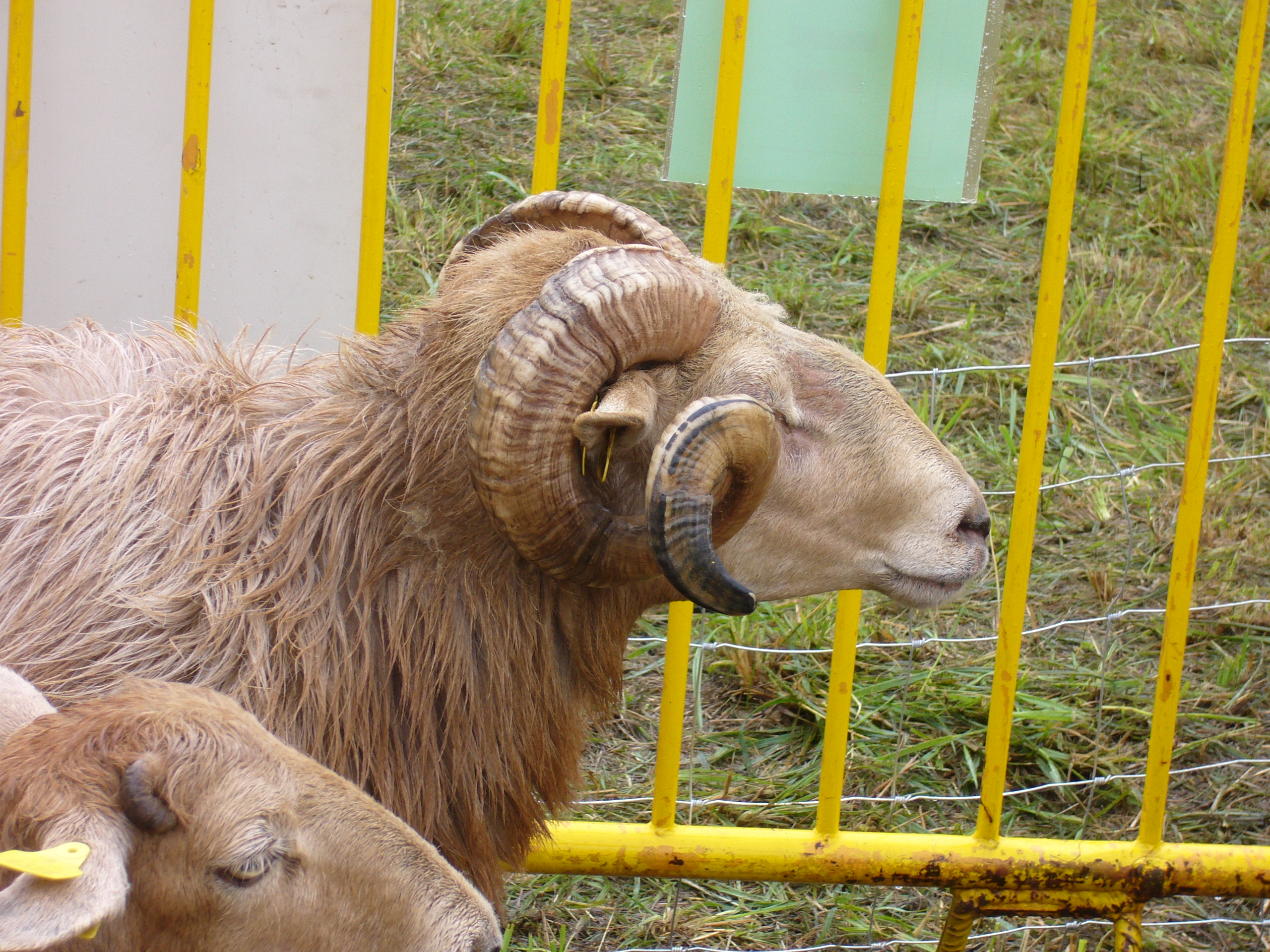 Sasardi arrazako aharia